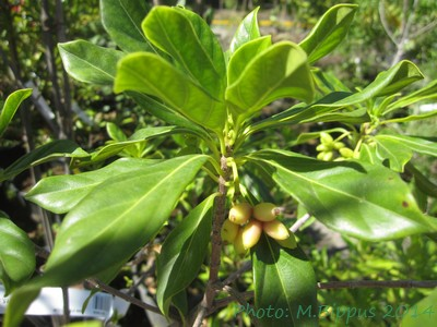 Antirhea borbonica